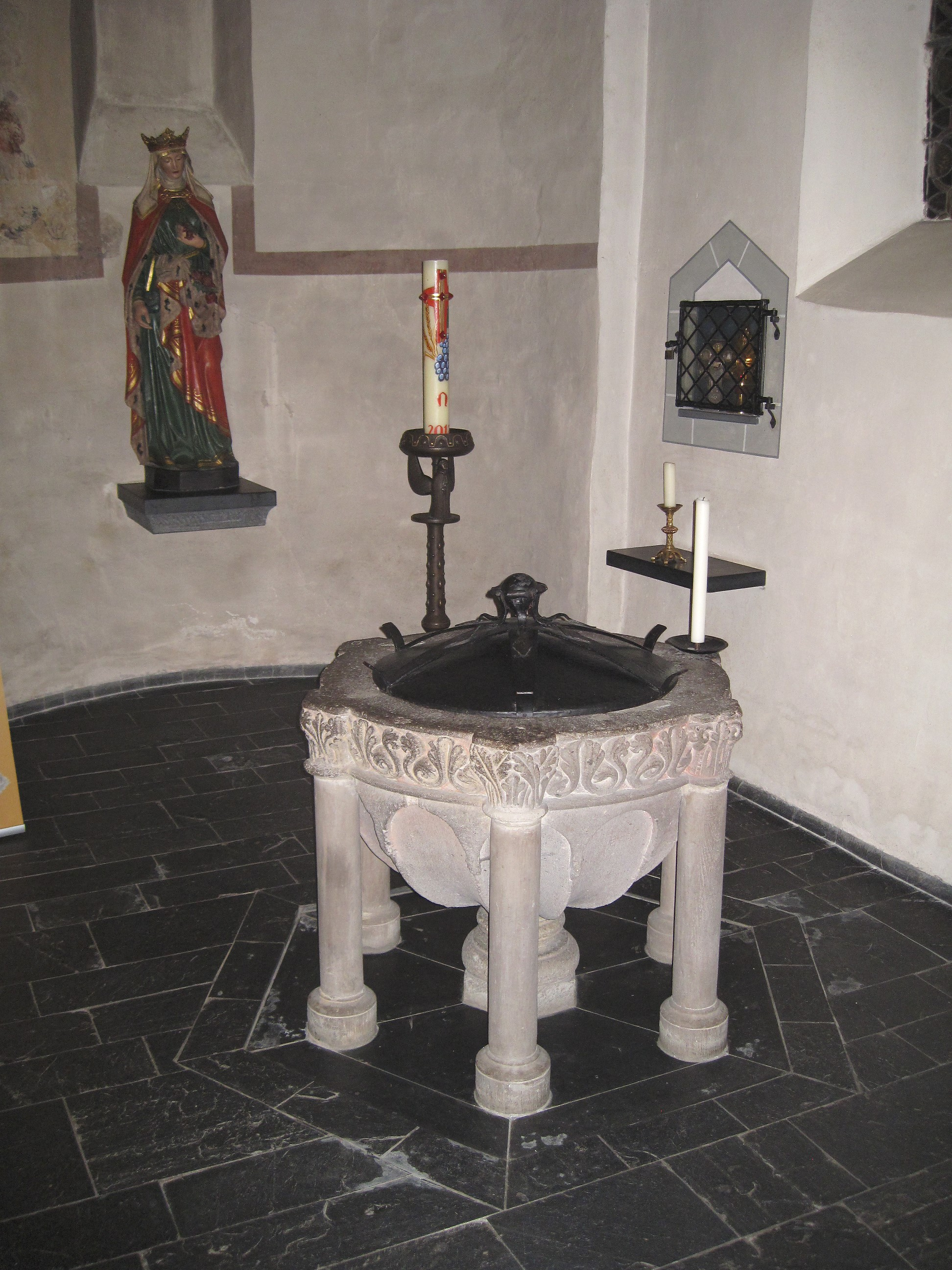 Taufstein aus dem 13. Jahrhundert in der katholischen Kirche St. Clemens (alter Teil) in Drolshagen, Kirchplatz 3.